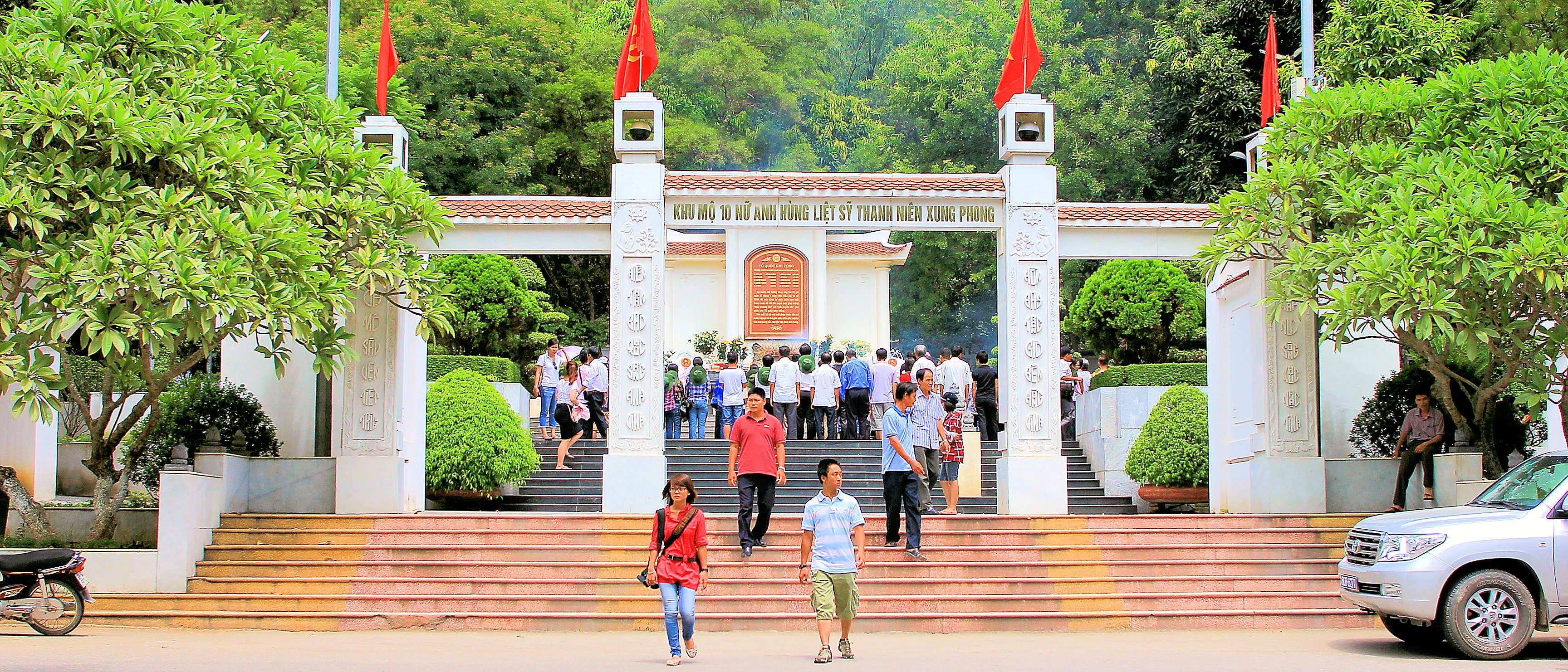 Khu mộ 10 nữ liệt sỹ thanh niên xung phong